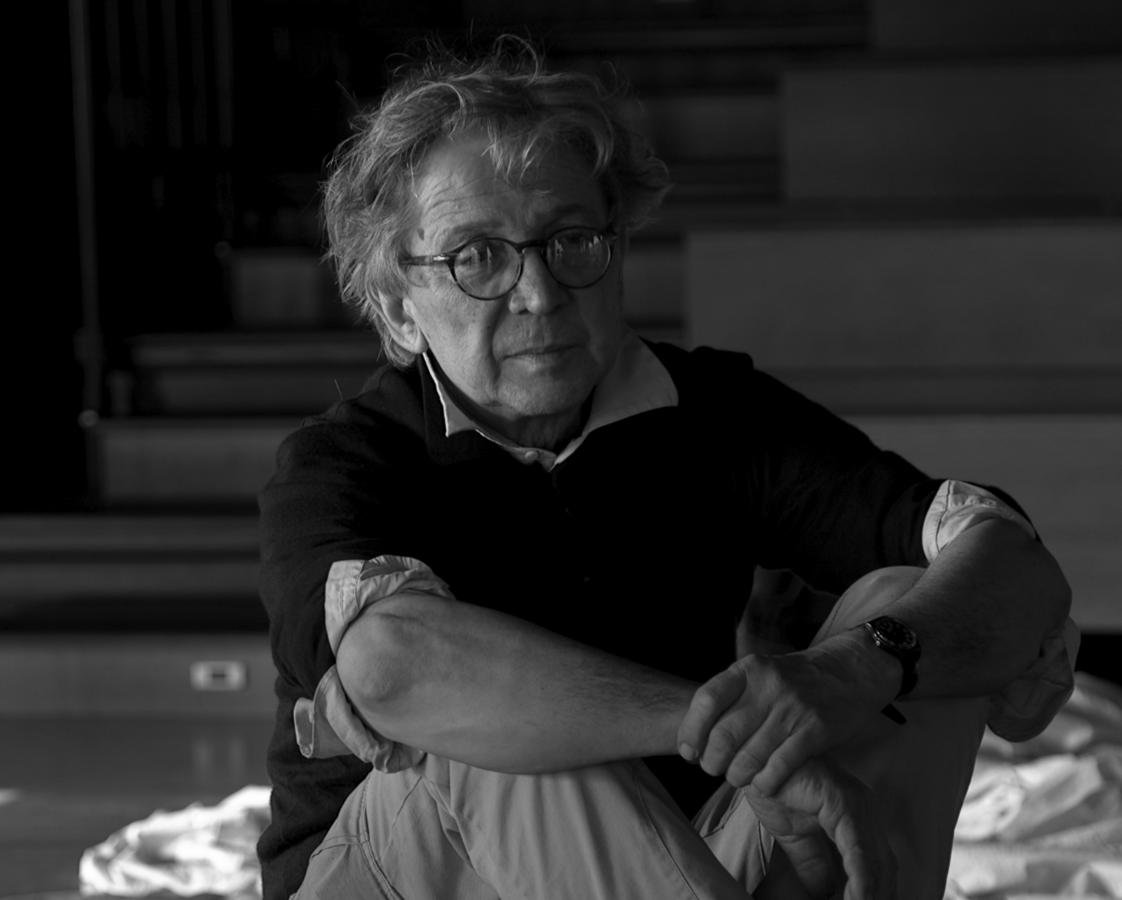 Cesare Ronconi